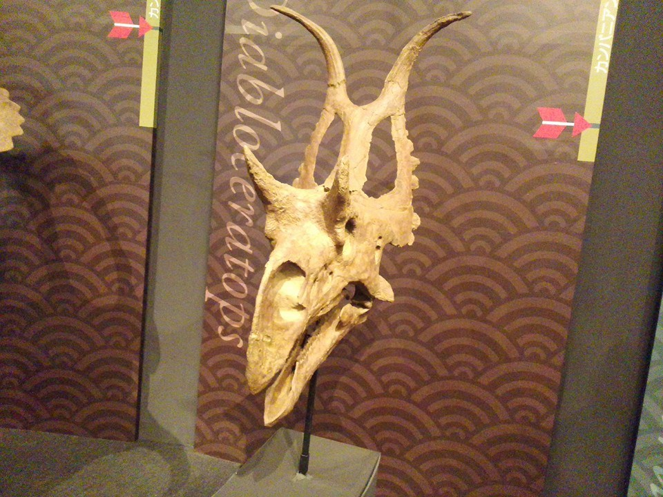 ディアブロケラトプス・エアトニの頭骨（大阪市立自然史博物館特別展・恐竜戦国時代の覇者！トリケラトプスにて）